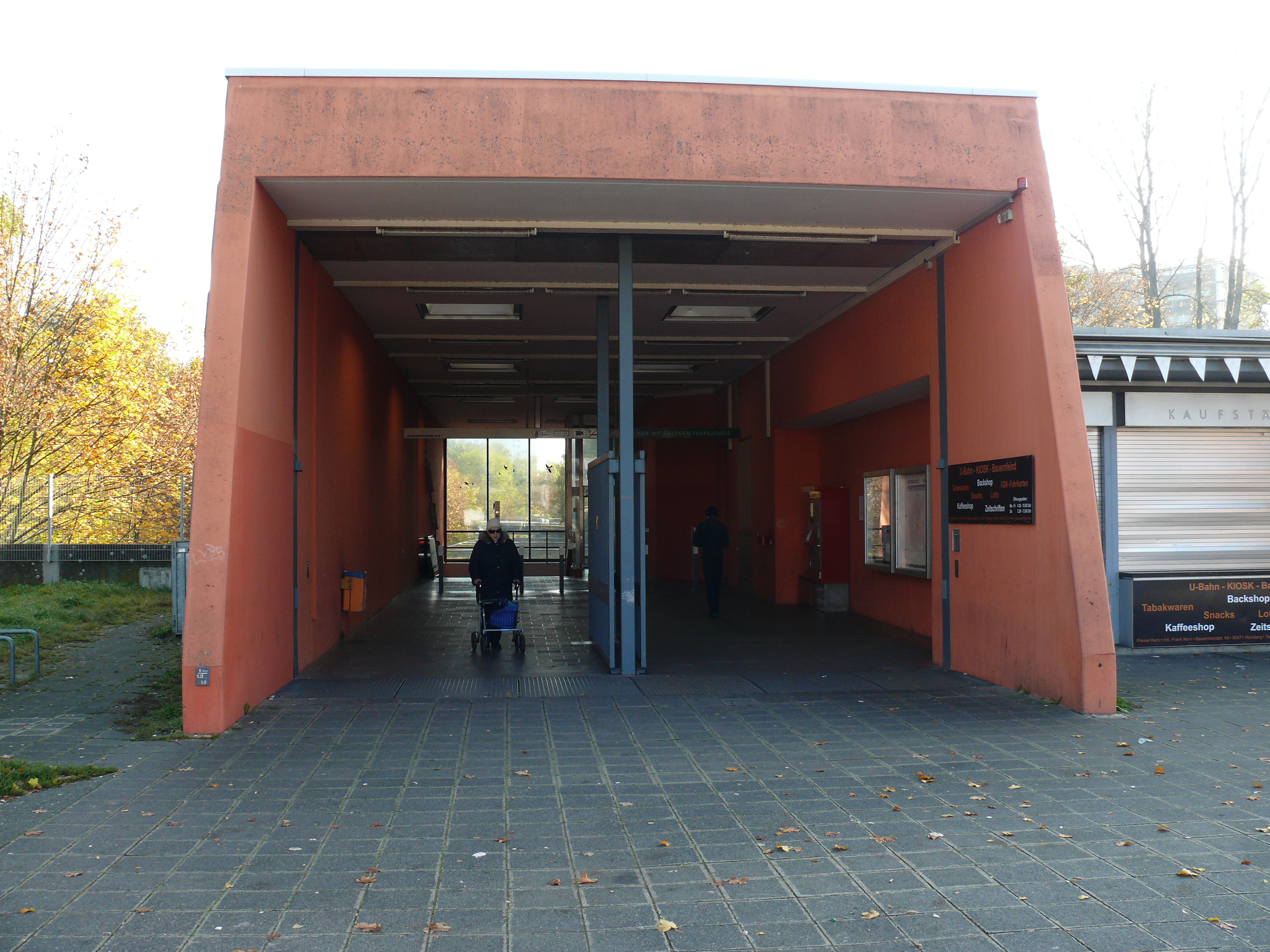 Zugangsgebäude über dem oberirdischen U-Bahnhof Bauernfeindstraße in Nürnberg.